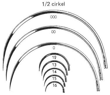 Hechtnaalden